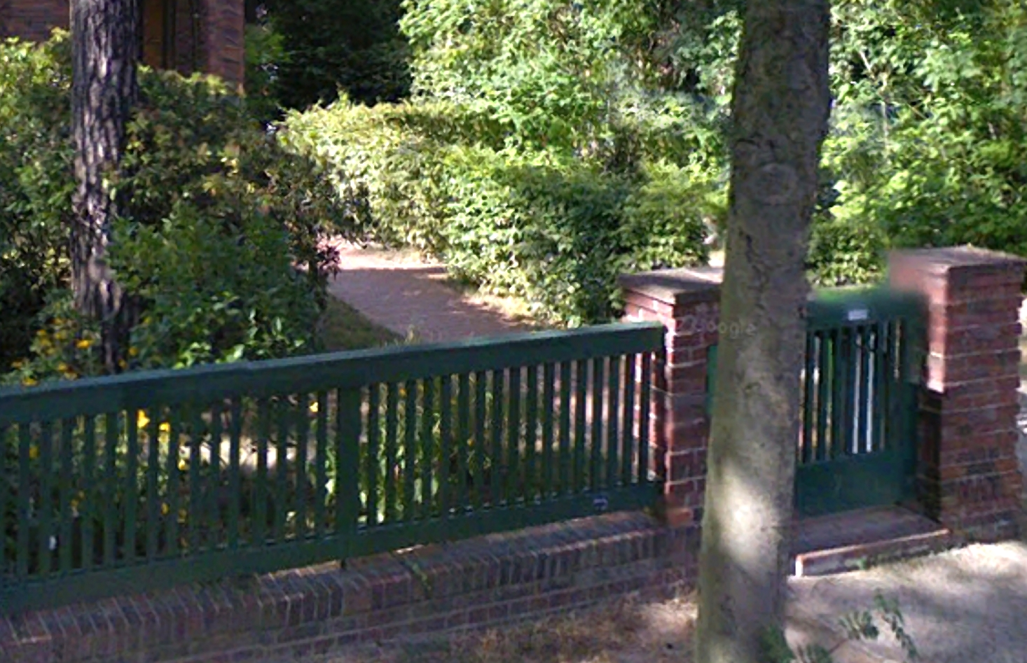 Baudenkmal in Frohnau, Benediktinerstr. 12